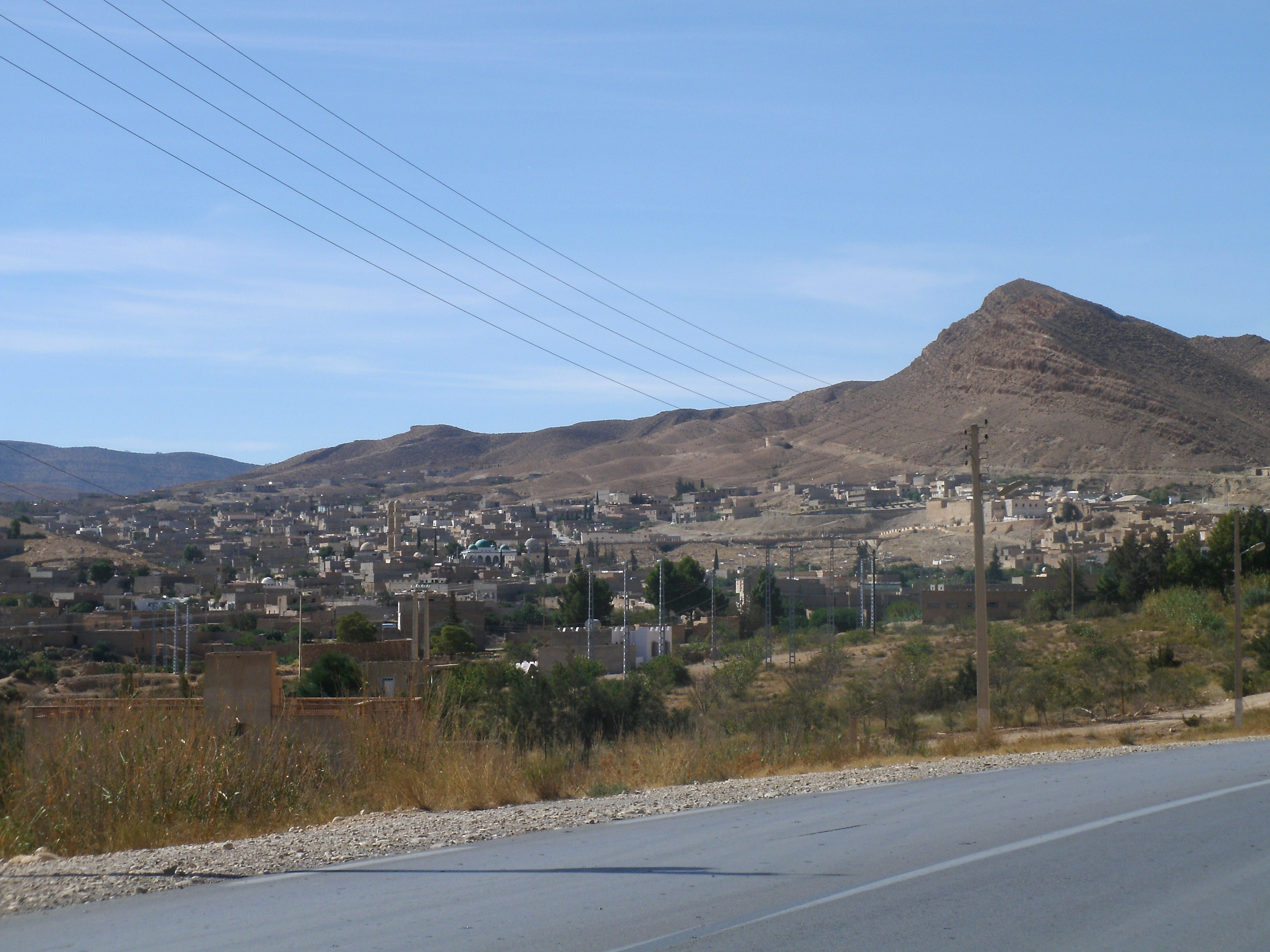 El Hamel